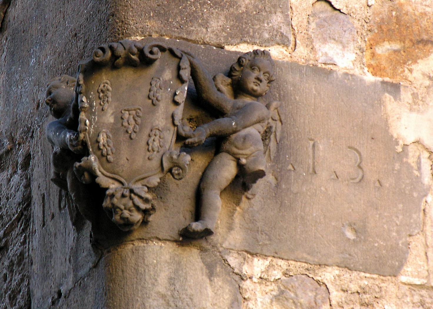 Casa de la Congregació de la Puríssima Sang. Cantonada de Plaça del Pi amb Cardenal Casañas. Barcelona